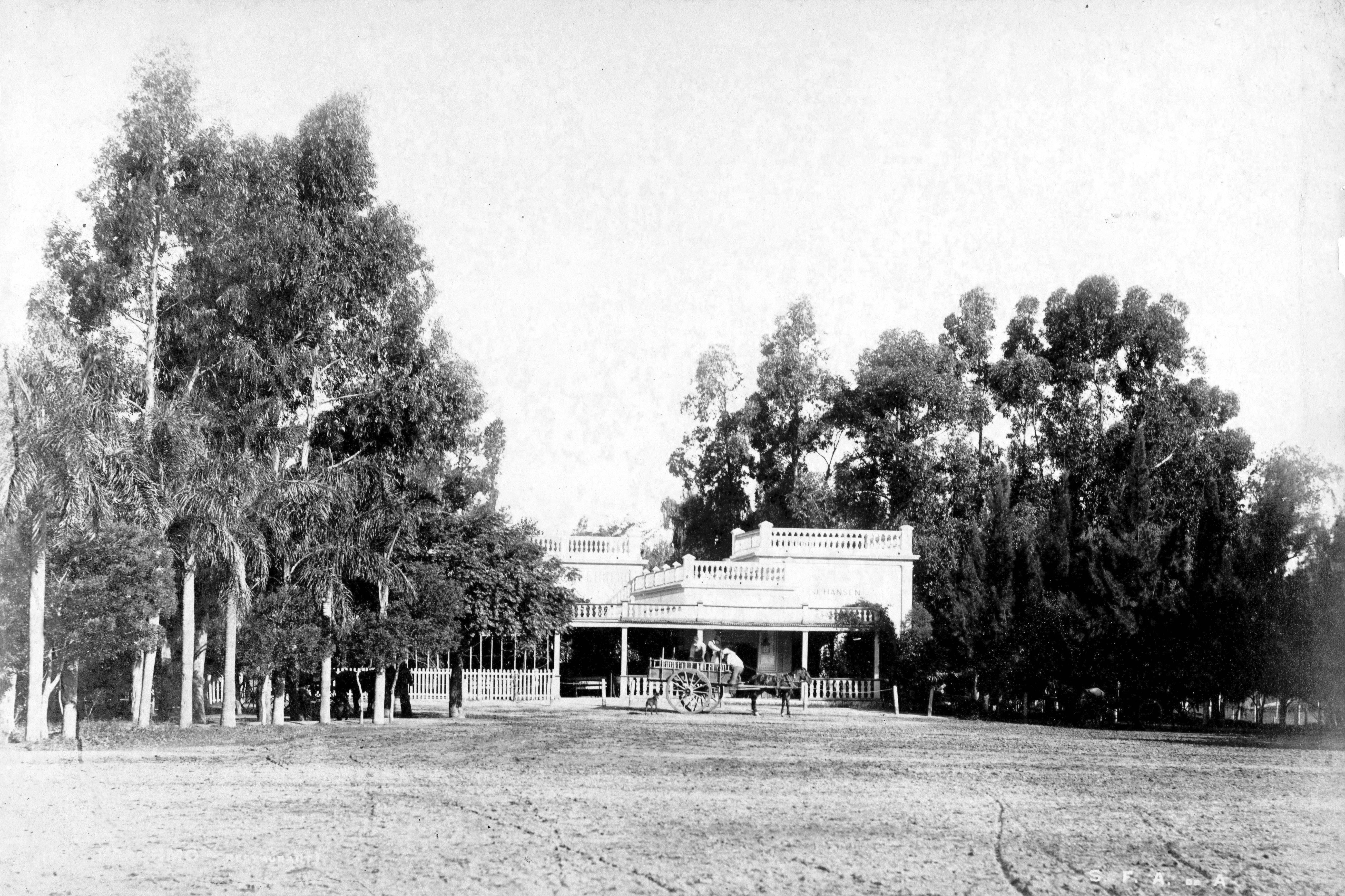 "Lo de Hansen" en Palermo donde se bailó tango entre 1877 y 1912. Inventario 213119 General Archive of the Nation (Argentina) Native nameArchivo General de la Nación ArgentinaLocationBuenos Aires, ArgentinaEstablished28 August 1821WebsiteAGNAuthority control : Q2860529 This file, was provided to Wikimedia Commons thanks to an agreement between the General Archive of the Nation of Argentina and Wikimedia Argentina.